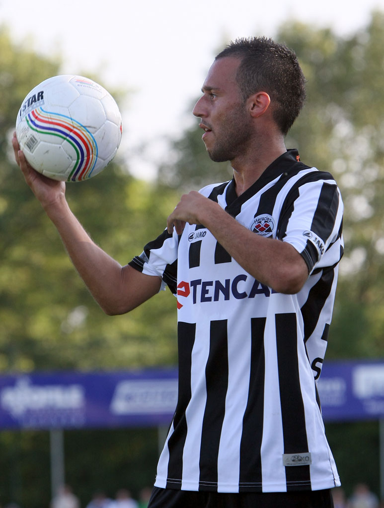 Qays Shayesteh tijdens een oefenwedstrijd van Heracles Almelo in en tegen Den Ham.